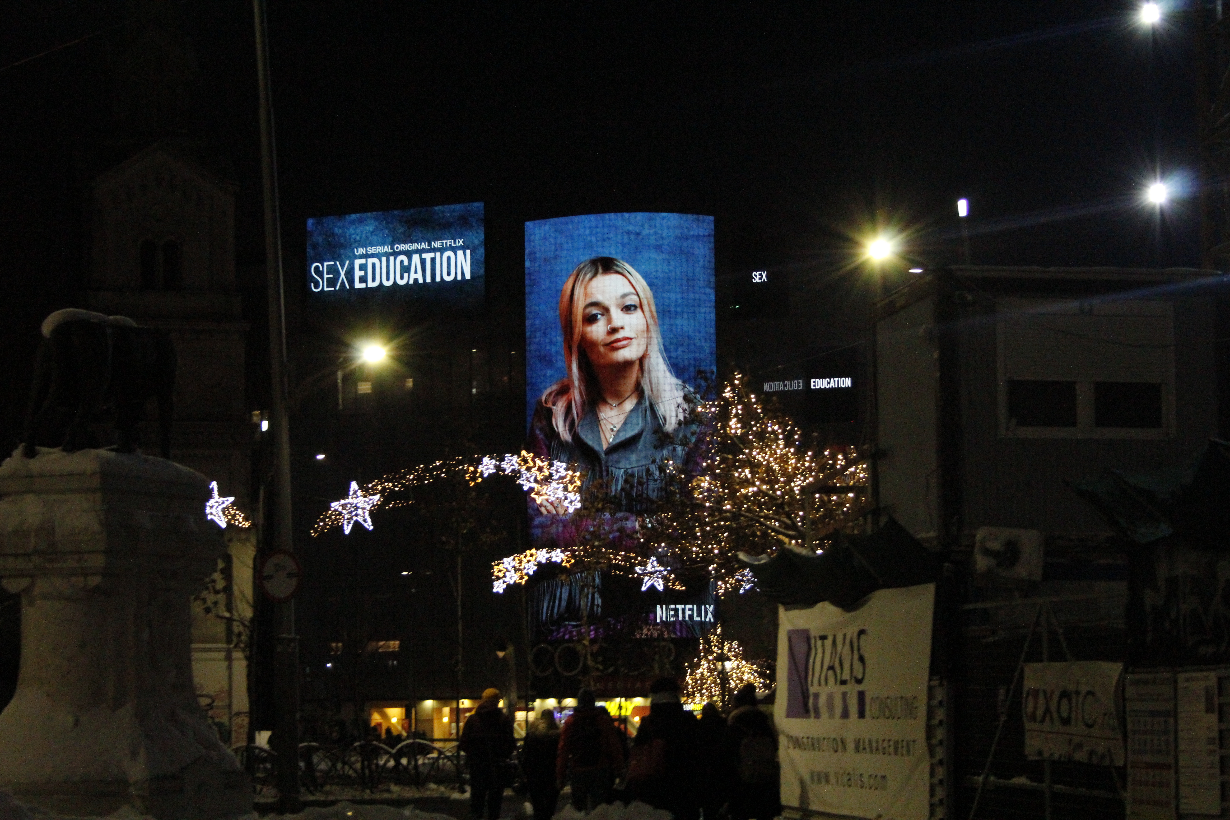 Schermo pubblicitario di Sex Education a Bucarest, Romania.